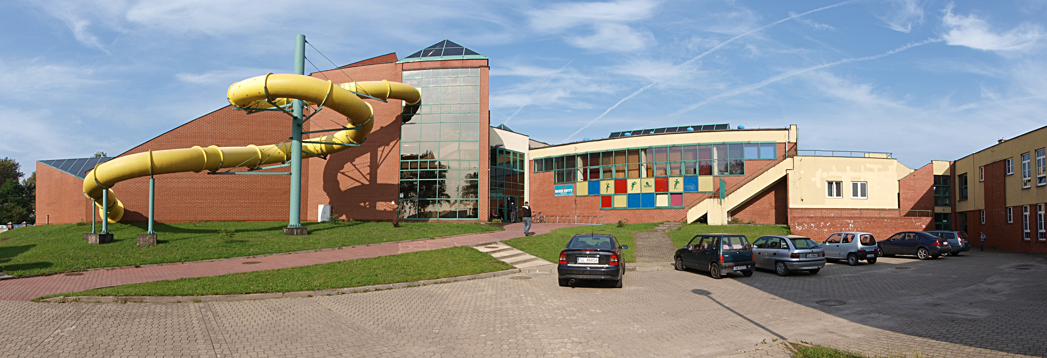 Ulica Chryzantem w Rudzie Śląskiej. Basen kryty Ruda.